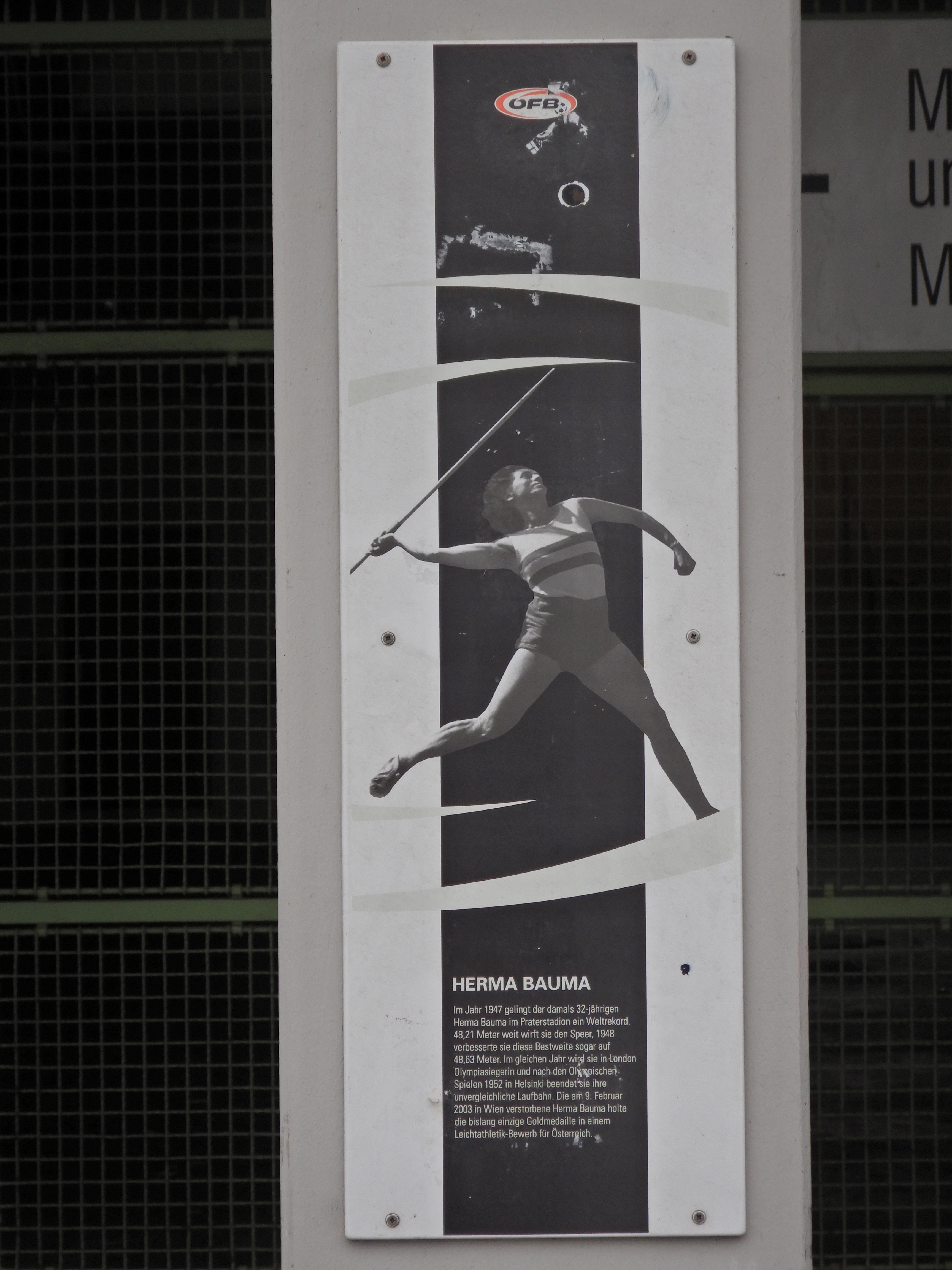 Gedenktafel für Herma Bauma (Wien, Meiereistraße 7, Ernst-Happel-Stadion)